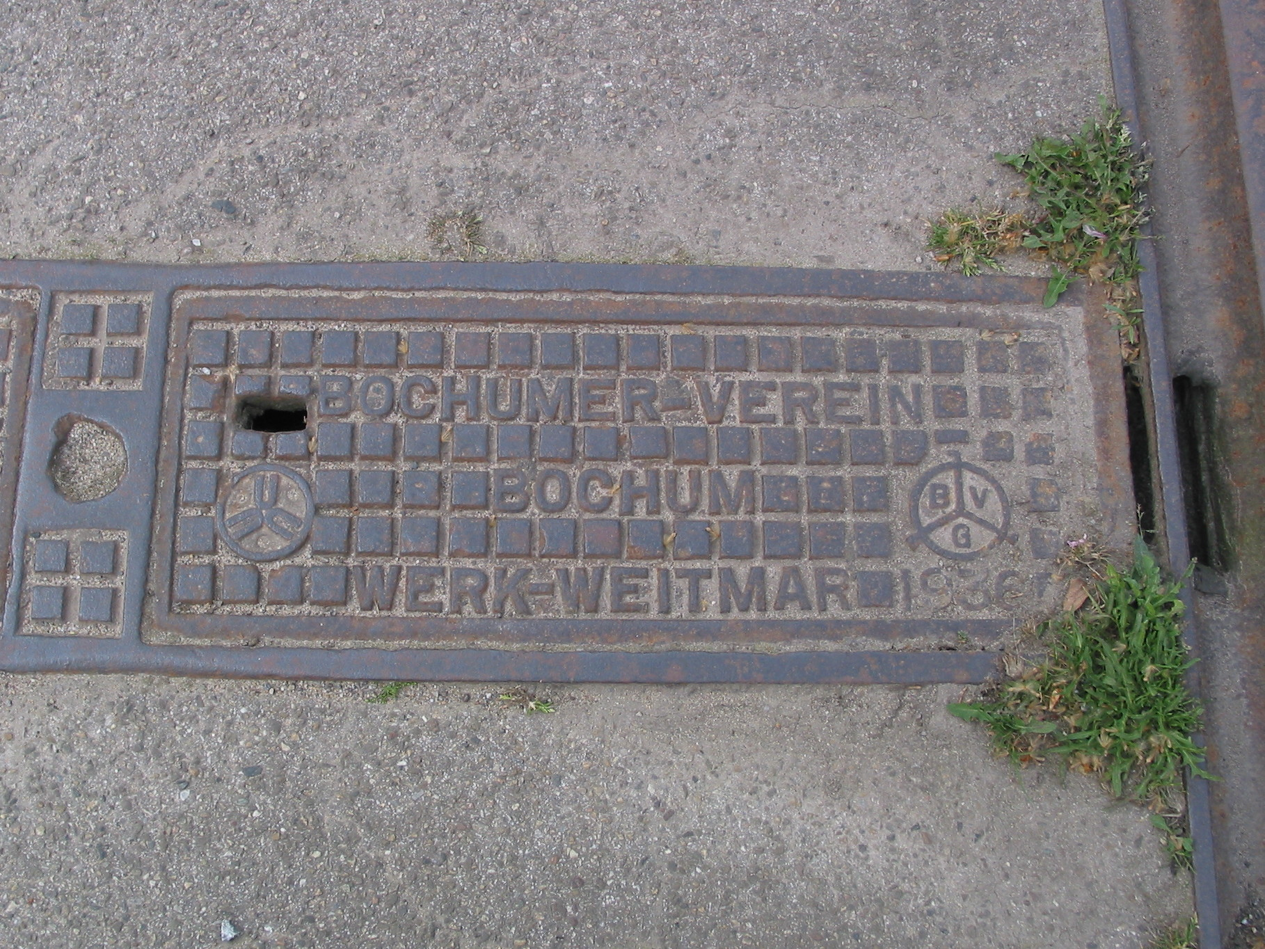 Erzeugnis der Rombacher Hütte, gesehen im Hafen von Krefeld -Uerdingen